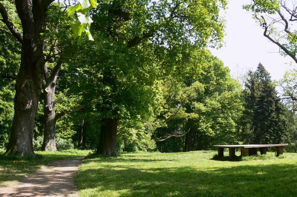 Steintisch im Ohrbergpark